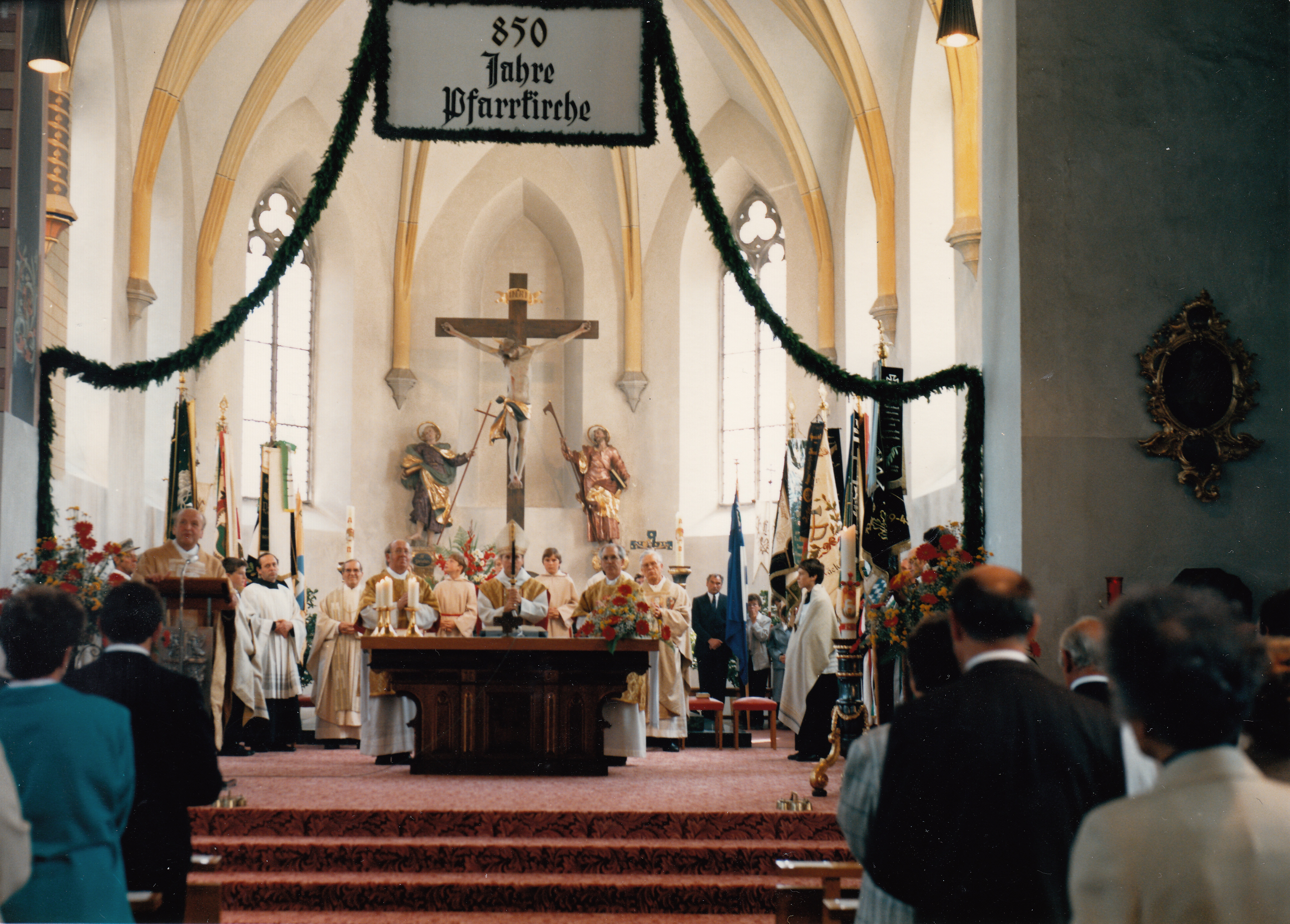 St. Philipp und Jakob, Bad Grönenbach, Landkreis Unterallgäu, Bayern